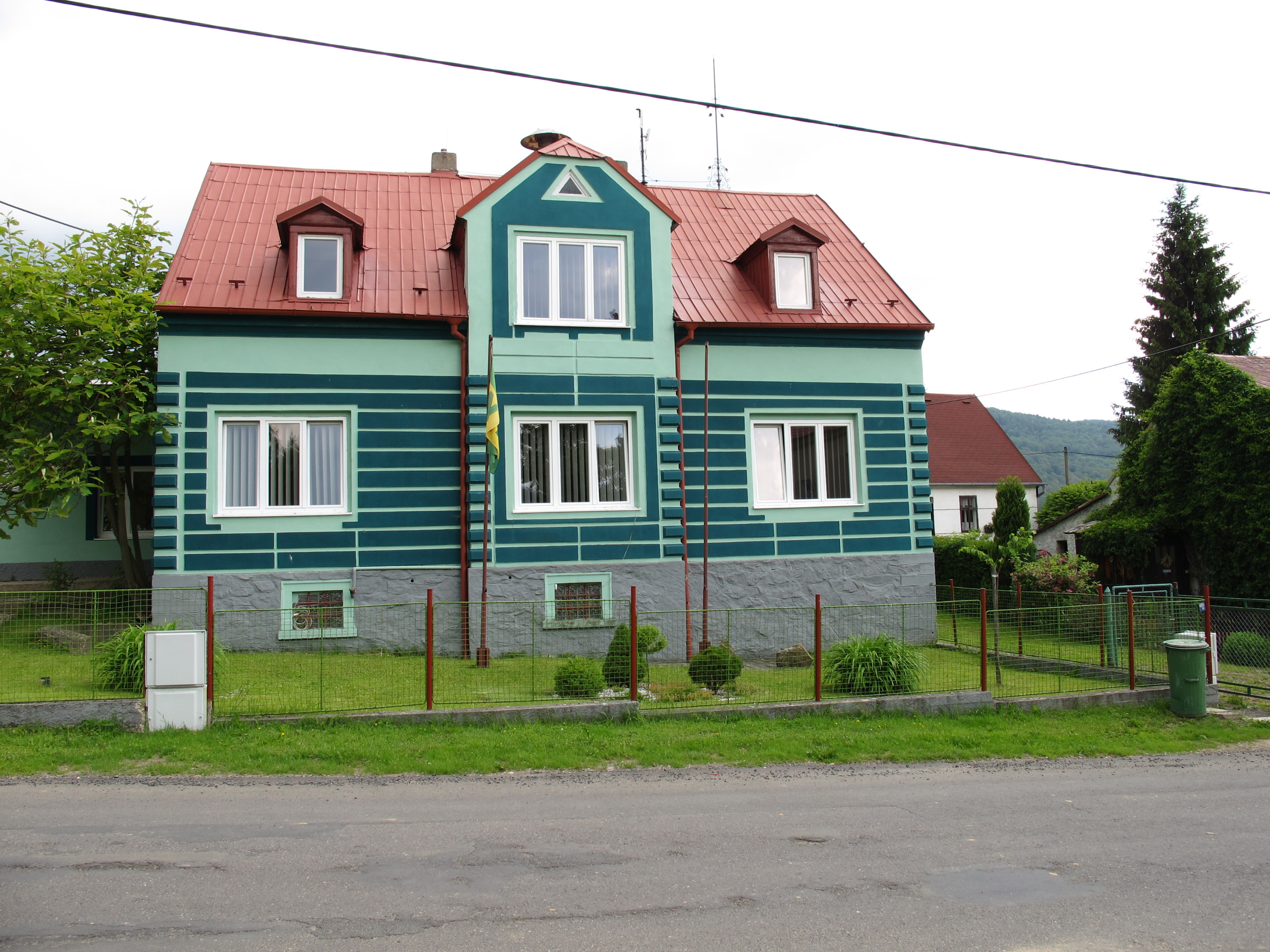 Sídlo obecního úřadu v Brandově (ul. Rudé armády č.p. 251)